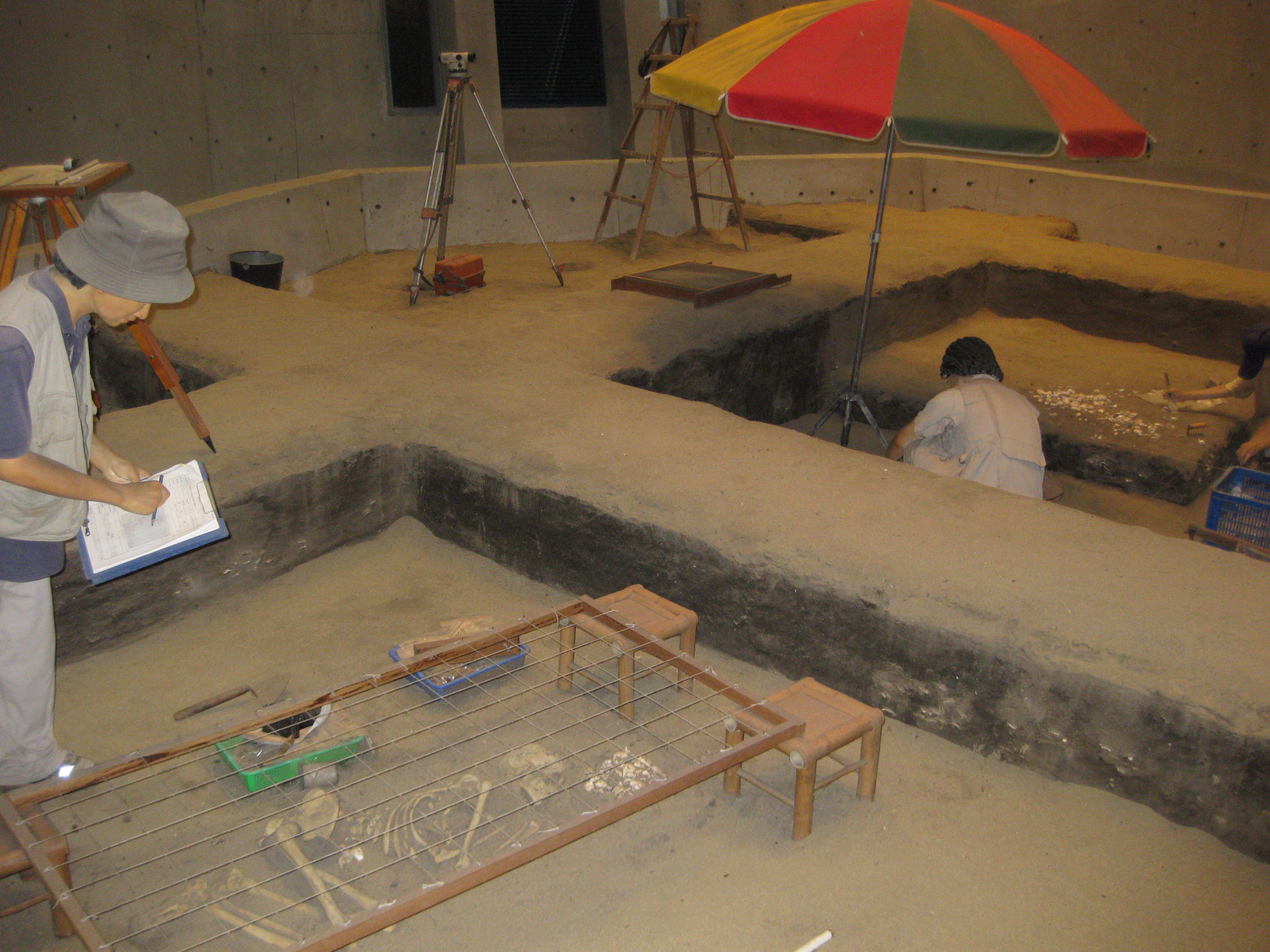 十三行博物館的考古遺址模型